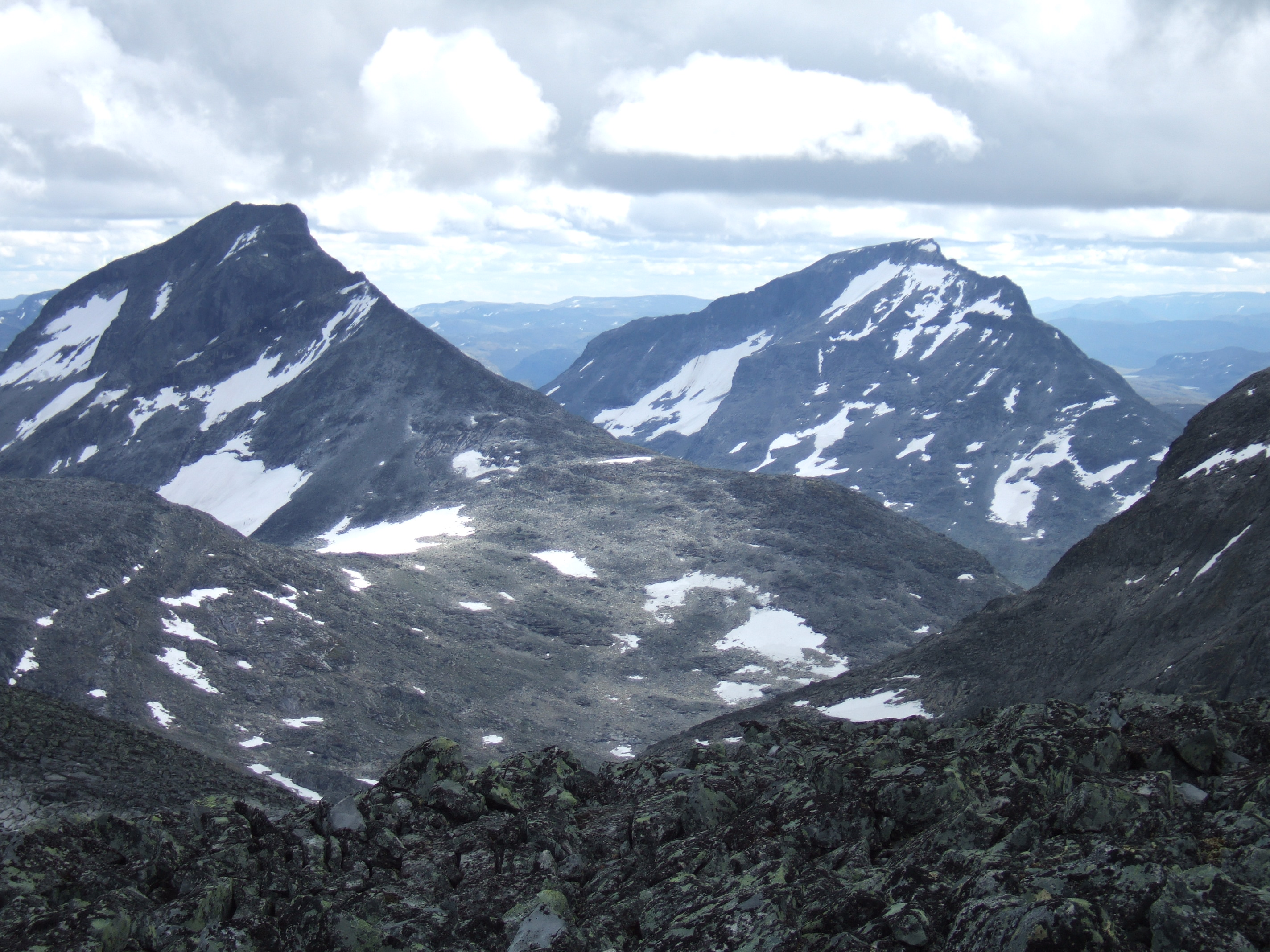 Store Rauddalseggje og Sjogholstind sett fra Midtre Høgvageltindane, Jotunheimen.